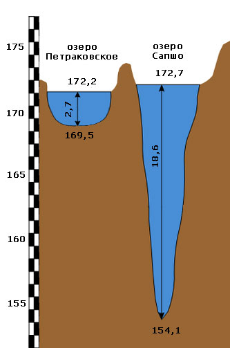 Соотношение уровня воды озера Сапшо и озера Петраковское